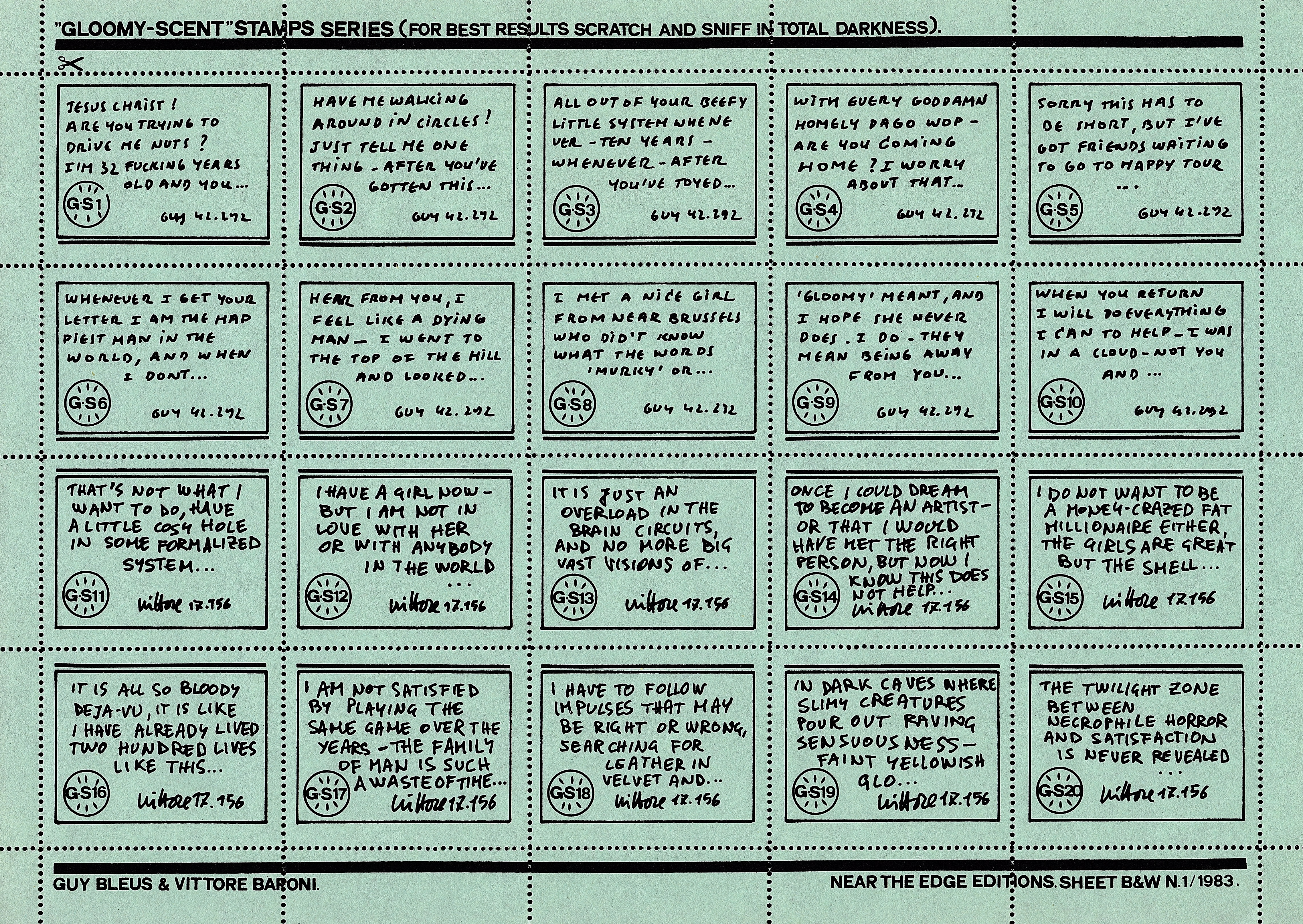 Guy Bleus & Vittore Baroni : "Gloomy-Scent" Stamp Series (For Best Results Scratch and Sniff in Total Darkness) - Edited by 'Near The Edge Editions', Italy, Sheet B&W N.1/1983. A sheet of 20 perforated and scented artistamps with text: 10 by Guy Bleus - 42.292 (Belgium) and 10 by Vittore Baroni - 17.156 (Italy).